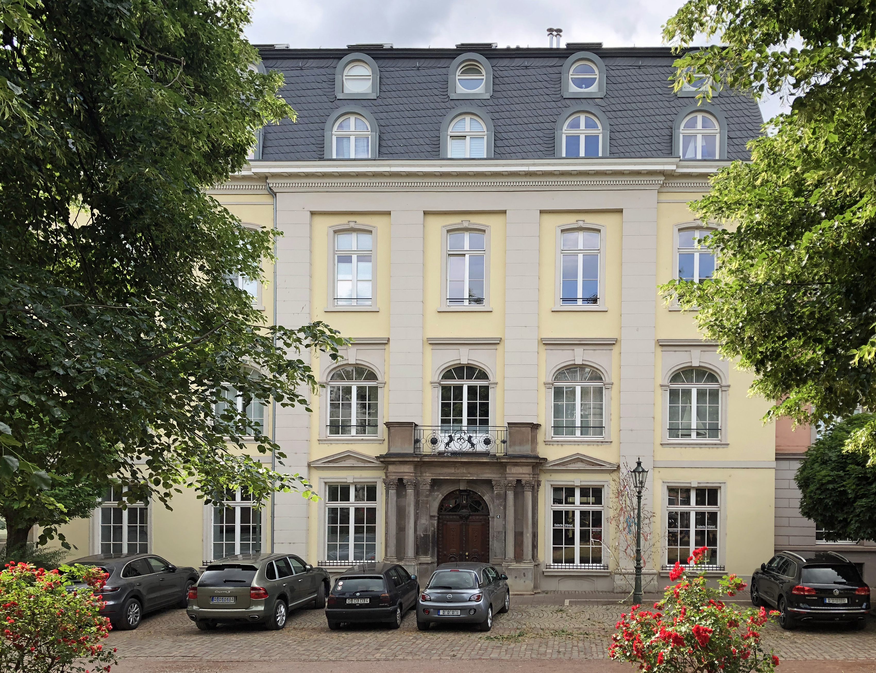 Orangeriestraße 6 mit Eingang (dritten Achse, rechts), Düsseldorf